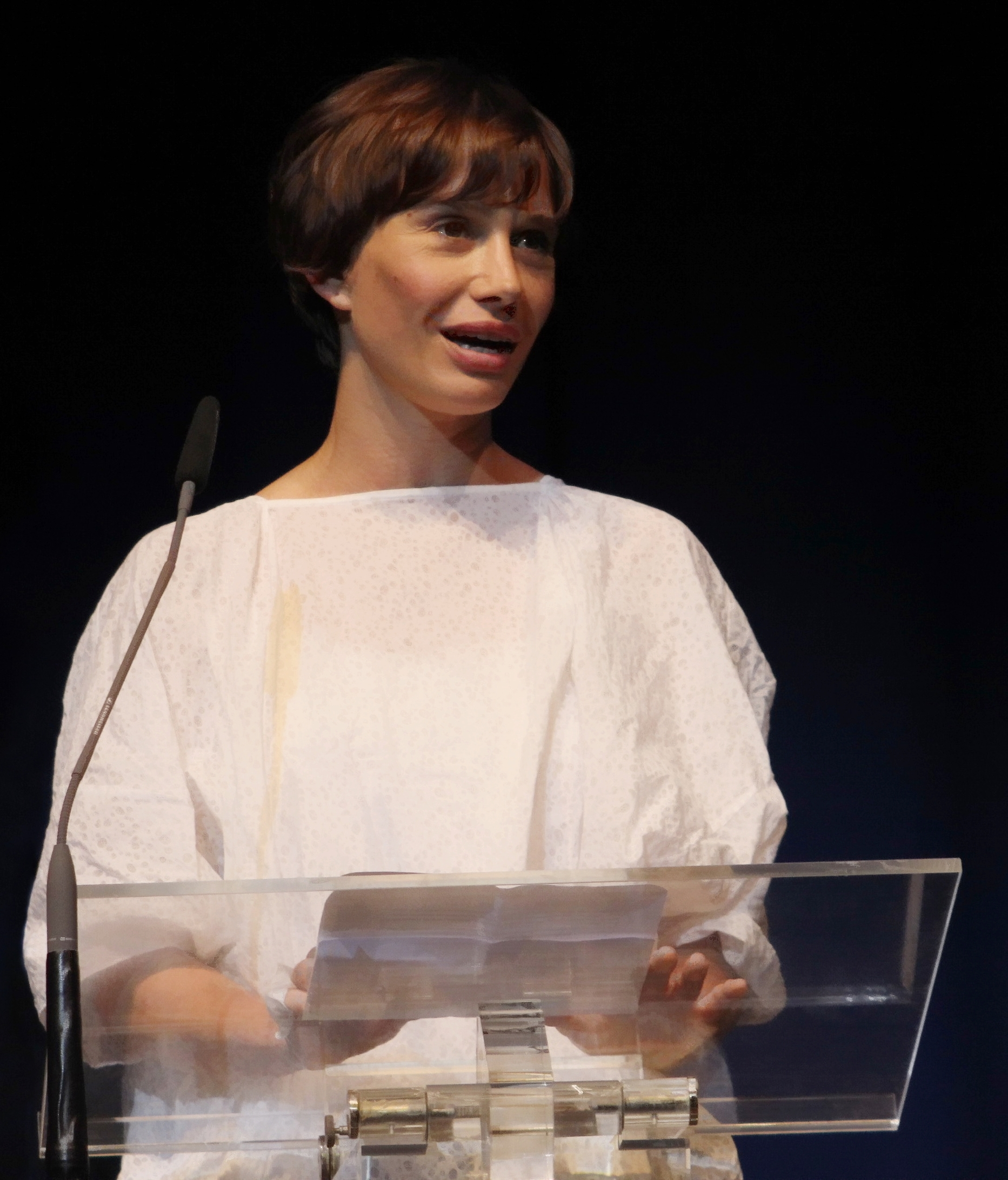 Nadeshda Brennicke als Jurymitglied beim Bernd Burgemeister Fernsehpreis 2012